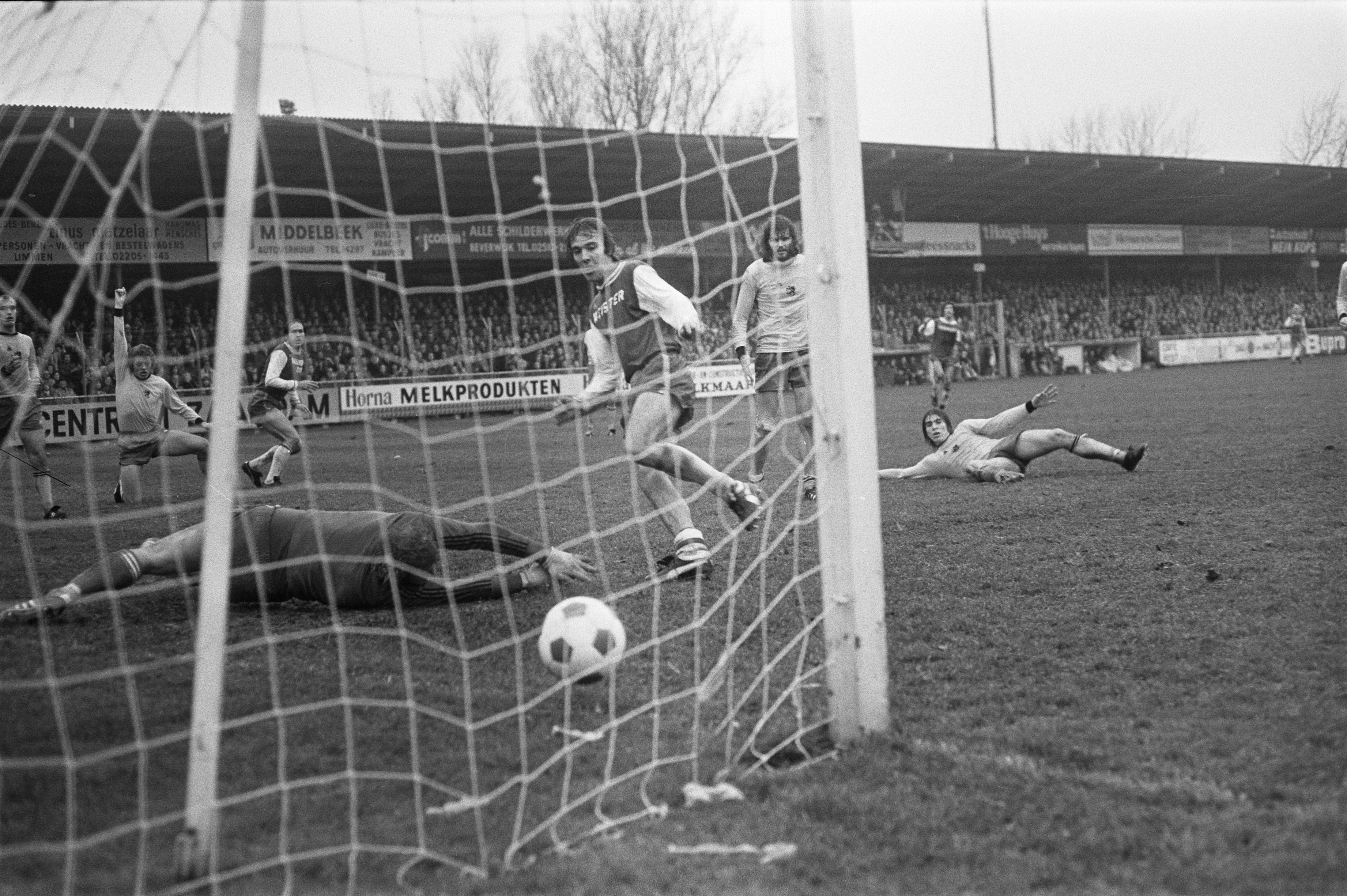 Collectie / Archief : Fotocollectie Anefo Reportage / Serie : [ onbekend ] Beschrijving : AZ67 tegen Ajax 3-0, Meijster (midden) scoort eerste AZ-doelpunt, links doelman Schrijvers, rechts Dusbaba en van rechts Hulshof Datum : 1 december 1974 Trefwoorden : sport, voetbal Persoonsnaam : Dusbaba, Hulshof Fotograaf : Croes, Rob C. / Anefo Auteursrechthebbende : Nationaal Archief Materiaalsoort : Negatief (zwart/wit) Nummer archiefinventaris : bekijk toegang 2.24.01.05 Bestanddeelnummer : 927-6189